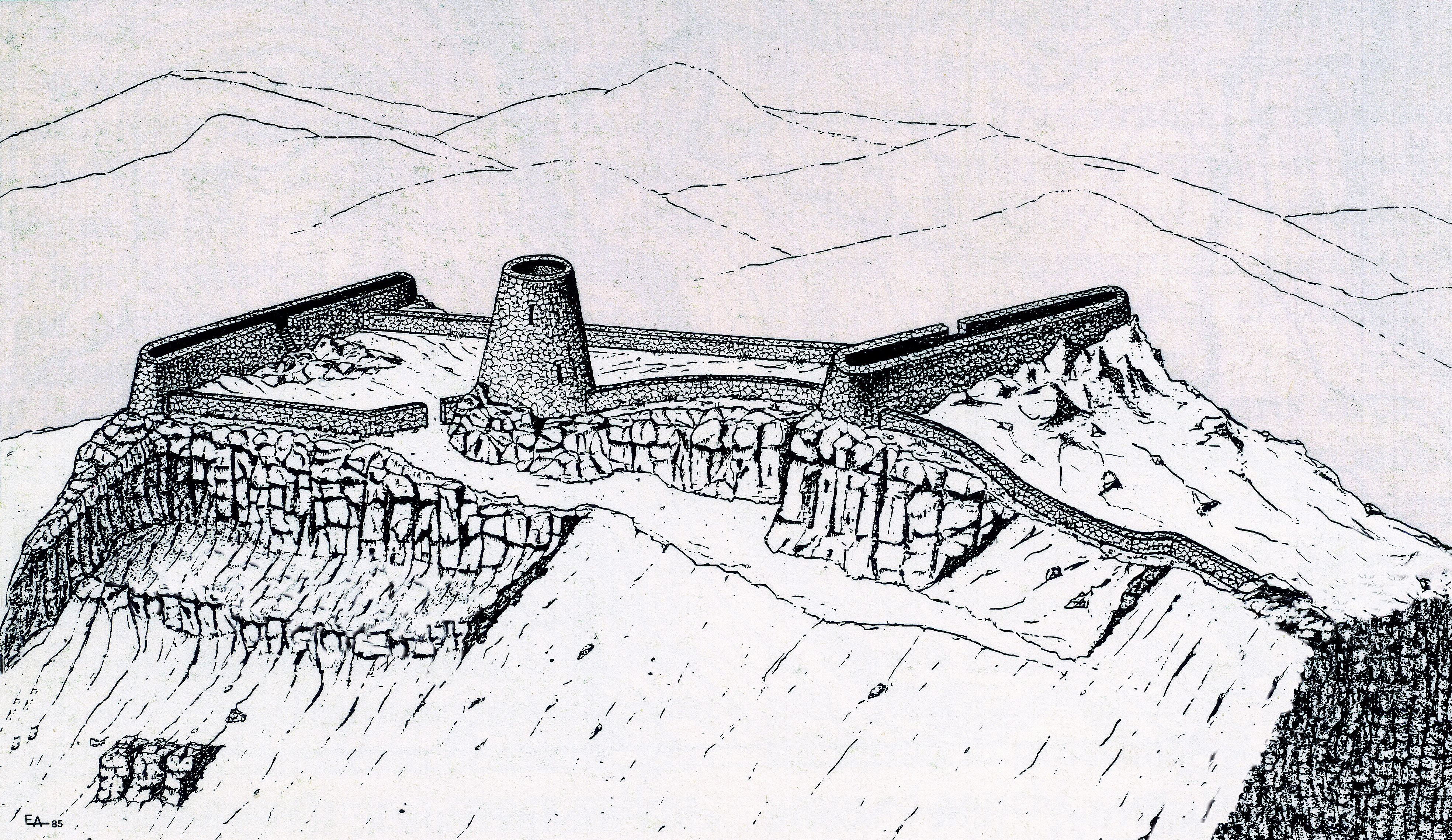 Ricostruzione della fortezza nuragica di Doladorgiu, scoperta da Elio Aste nel maggio del 1985 nel Supramonte di Baunei (disegno dello stesso Elio Aste, siglato e datato in basso a sinistra "EA 85")